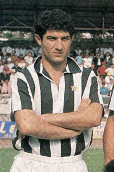 Biella, stadio Lamarmora, 21 agosto 1966. Il calciatore della Juventus, Erminio Favalli, in occasione della vittoriosa amichevole precampionato contro il Biella (3-0).